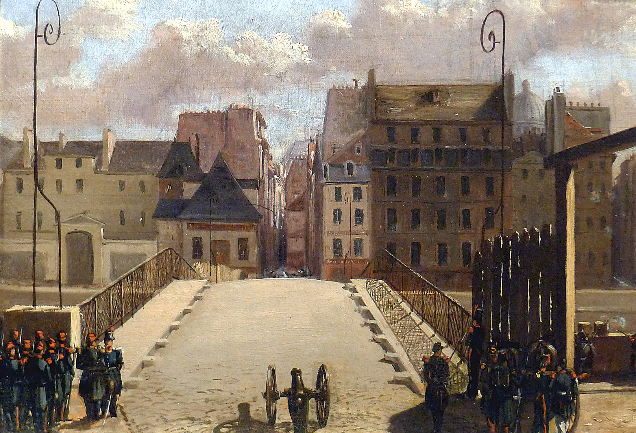 detail: Pont de l’Archevêché (Paris) en 1848